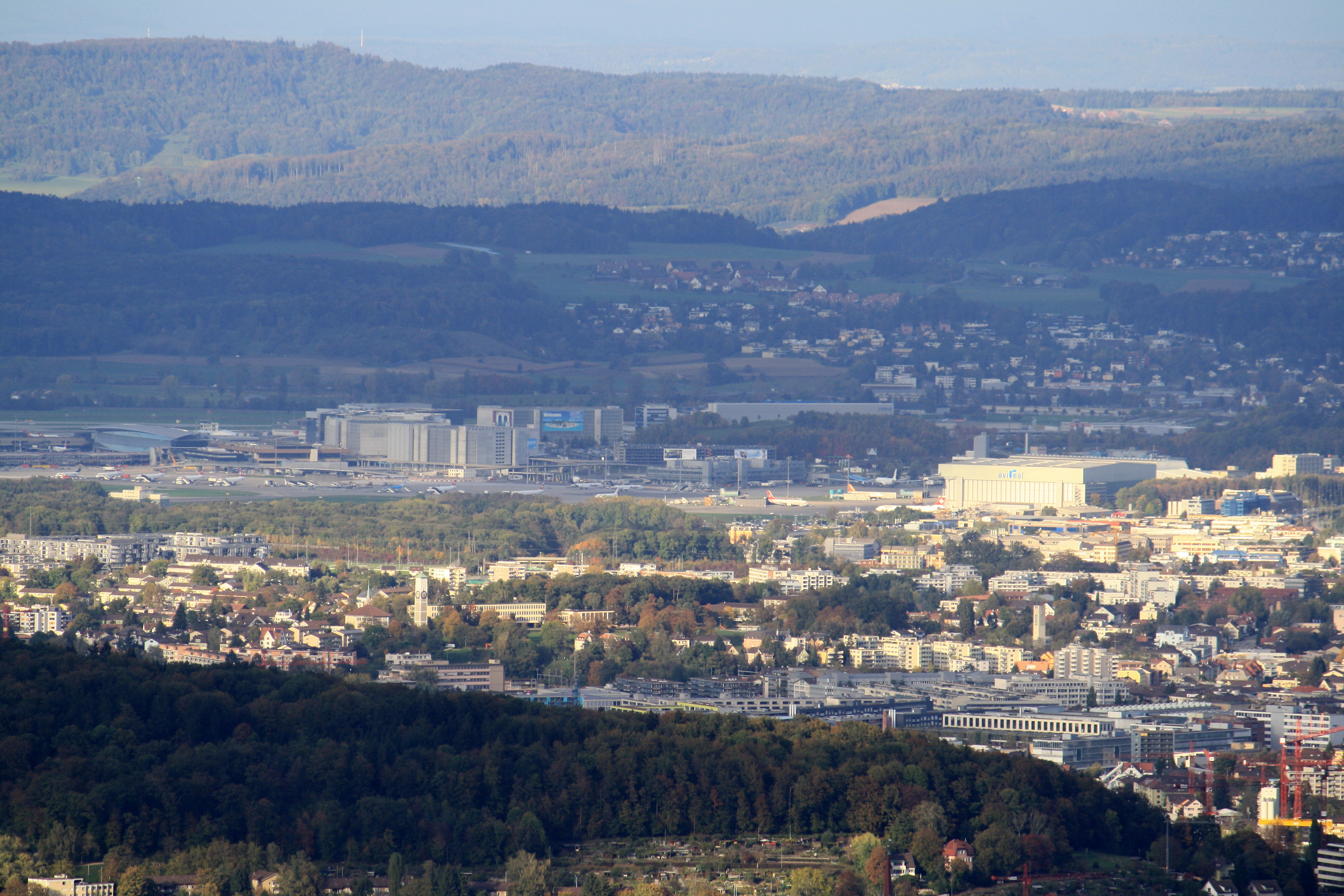 Käferberg, Zürich-Affoltern, Zurich International Airport and Kloten, as seen from Uetliberg Aussichtsturm.